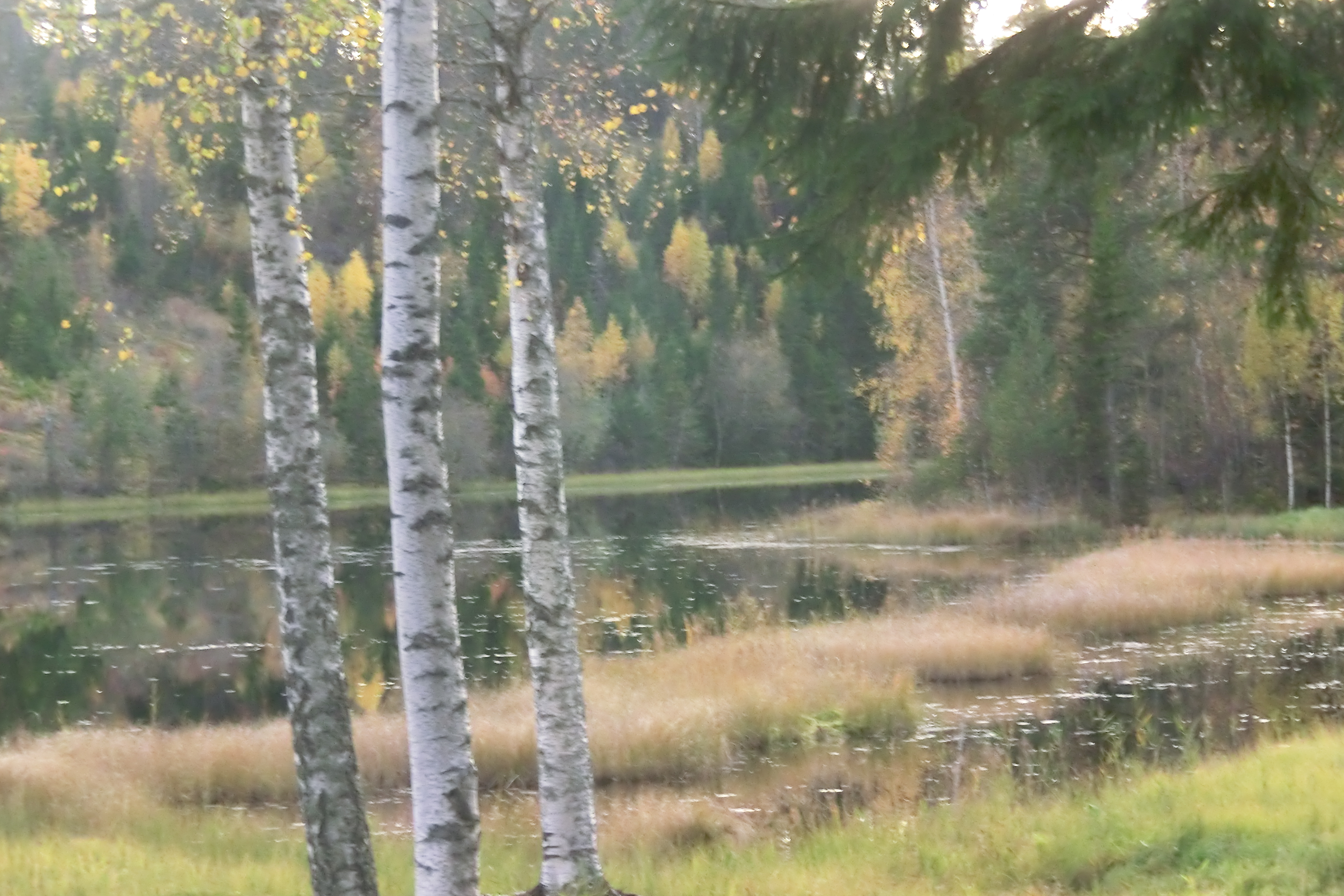 Åksjön (Bjärtrå socken, Ångermanland)